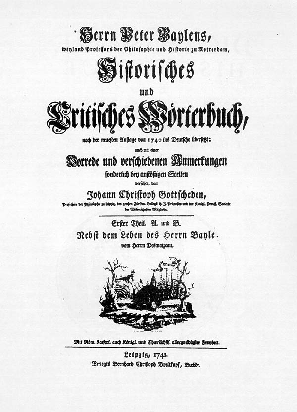 Titel von Johann Christoph Gottscheds "Historisches und Critisches Wörterbuch" von 1741 (eine Übersetzung von Pierre Bayles Dictionnaire historique et critique)